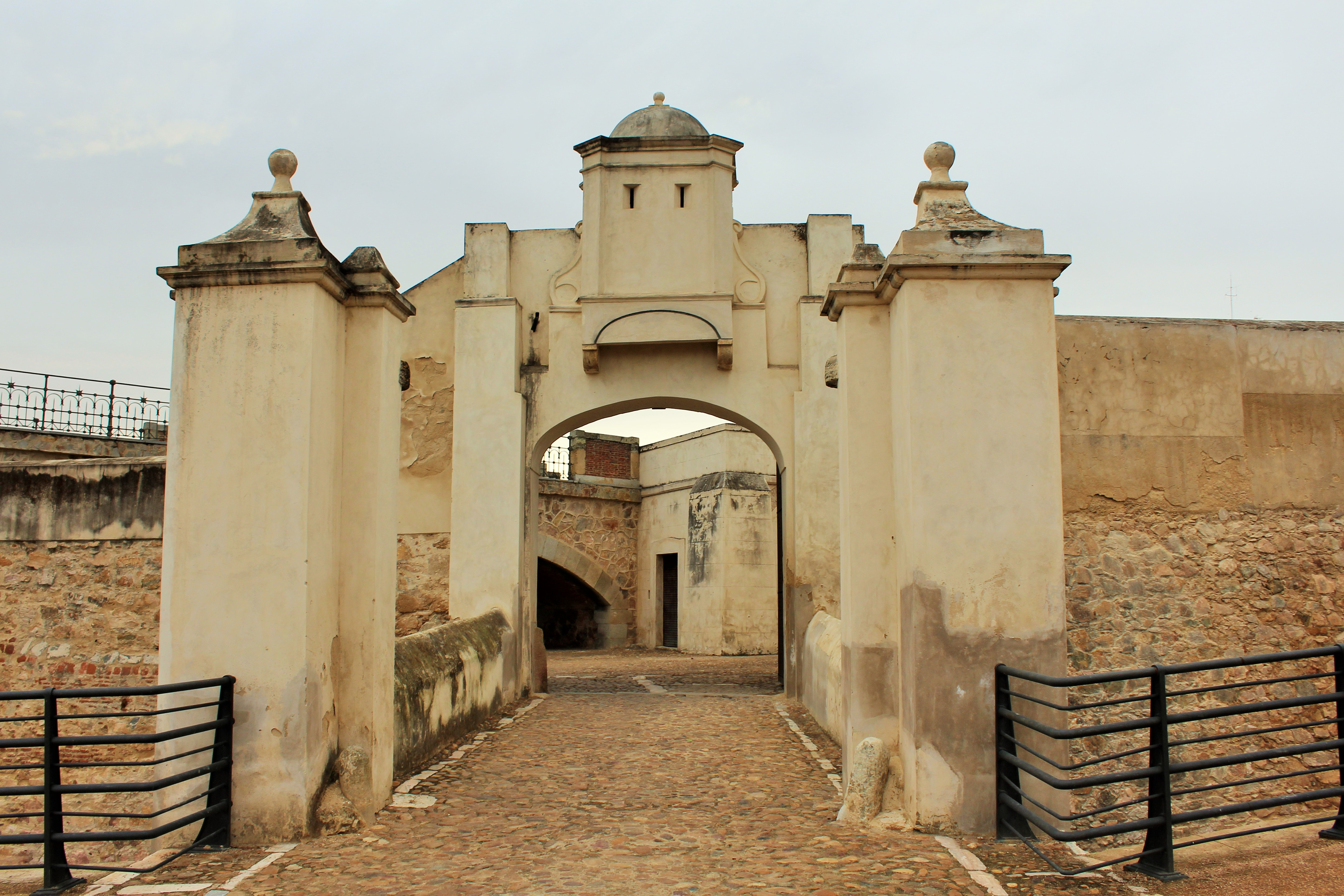 Fachada exterior, al este.